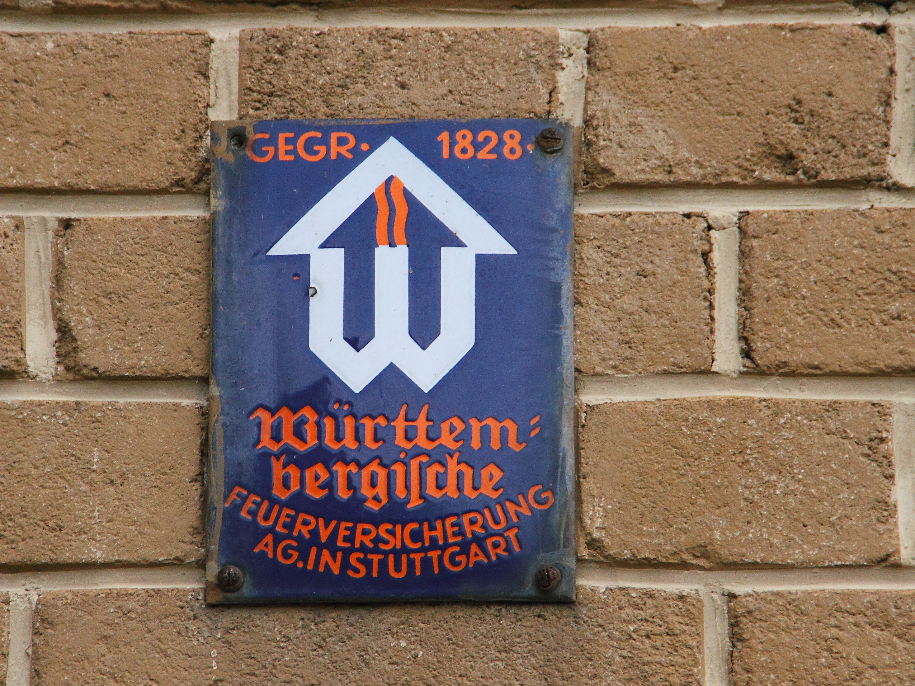 Das denkmalgeschützte ehemalige Rathaus und Schulgebäude im Niederstettener Ortsteil Herrenzimmern. Hier das Emailschild der ebenfalls im Gebäude untergebrachten Agentur der Württembergischen Feuerversicherung.